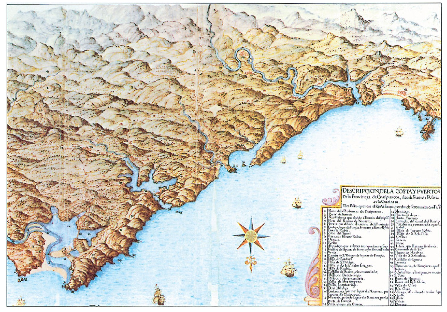 Gipuzkoako itsasertza (XVII. mendea).